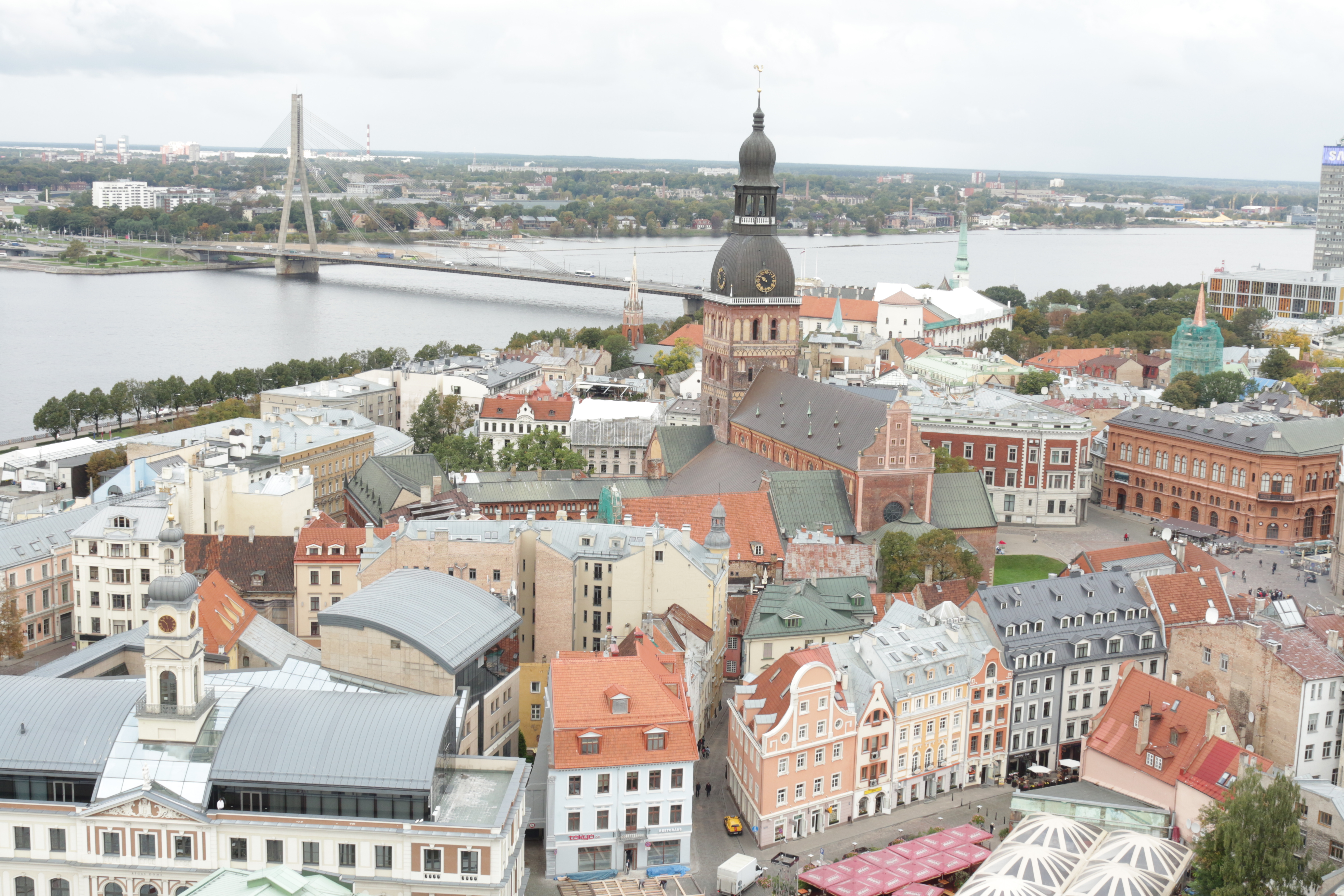 Рига (Латвія). Візитівка Риги (Ризький (Домський) собор, Домська площа). 24 вересня 2013 року